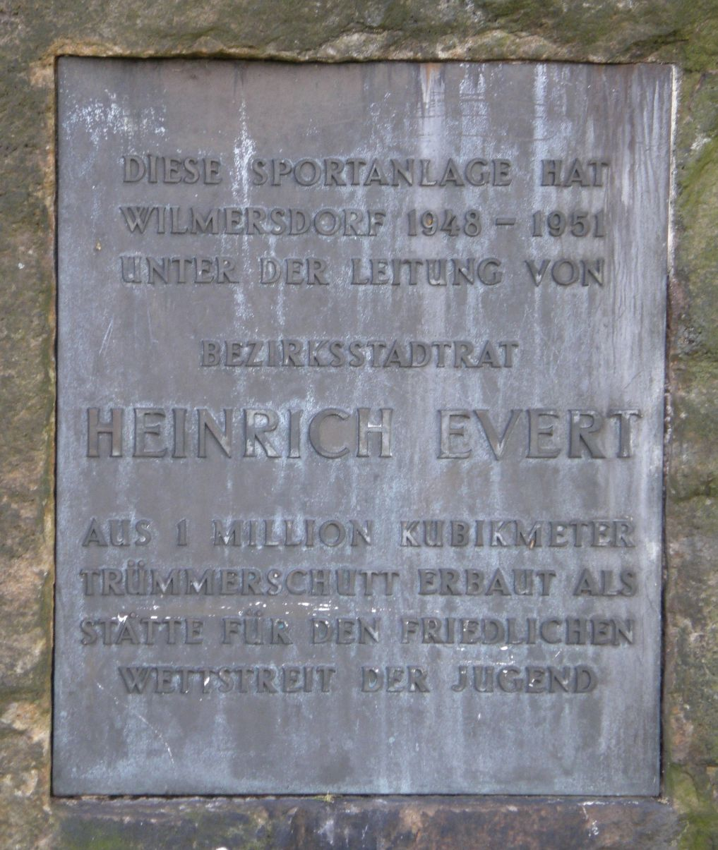 Gedenktafel der Stele am Stadion Wilmersdorf in Berlin